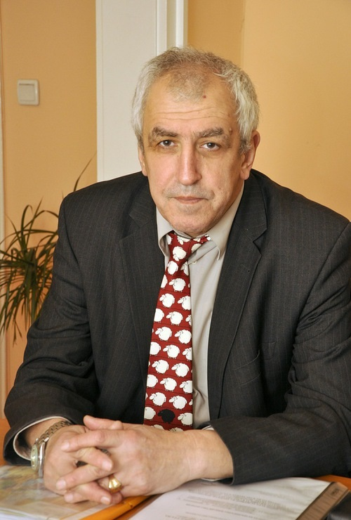 Симеон Ананиев